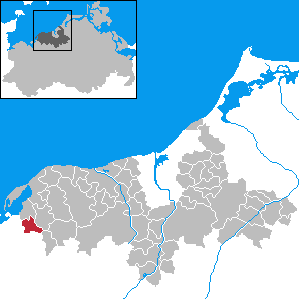 Alt Bukow in Mecklenburg-Western Pomerania - District Bad Doberan